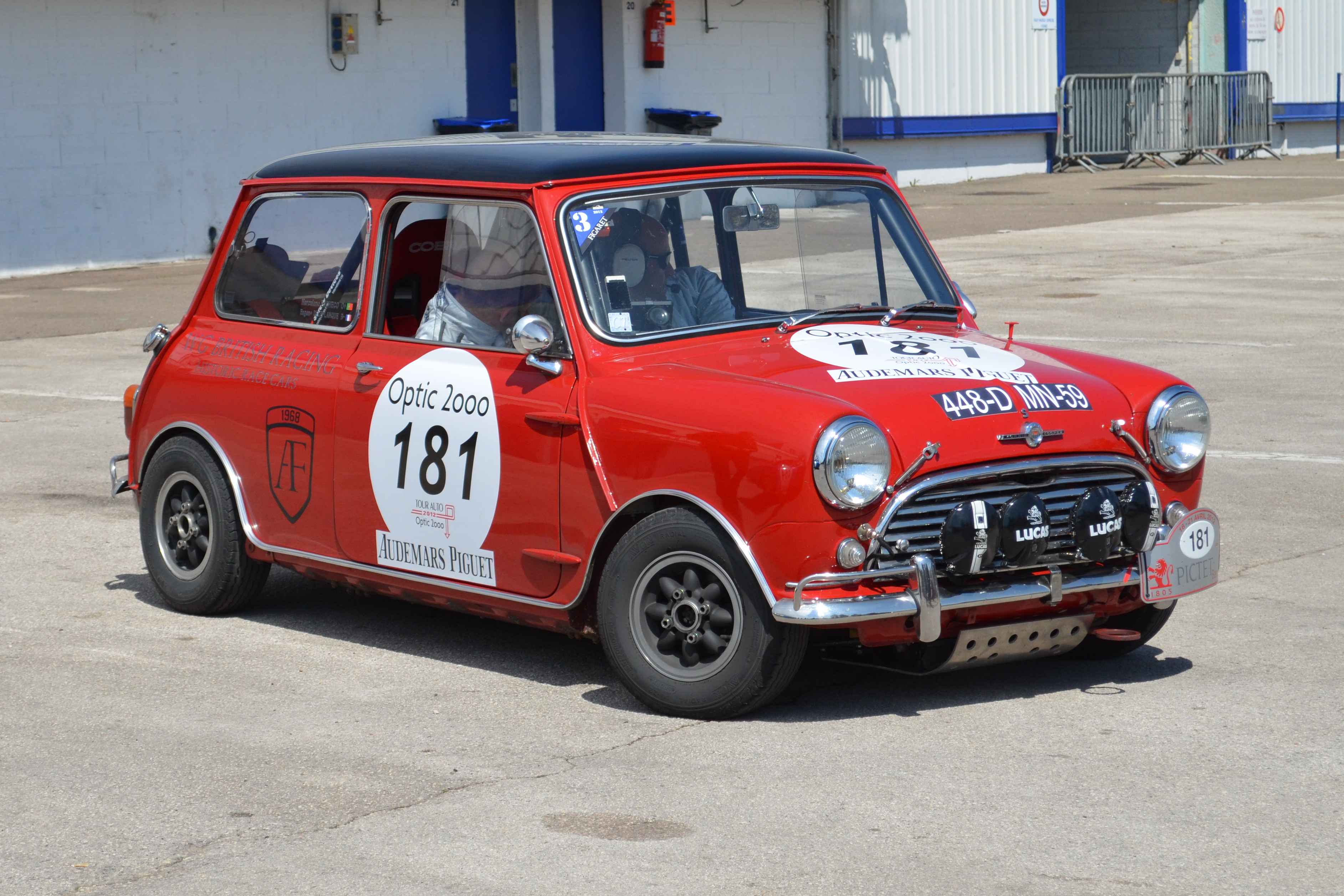 Mini Cooper S, numéro 181, Tour Auto 2012, étape sur le Circuit de Prenois.